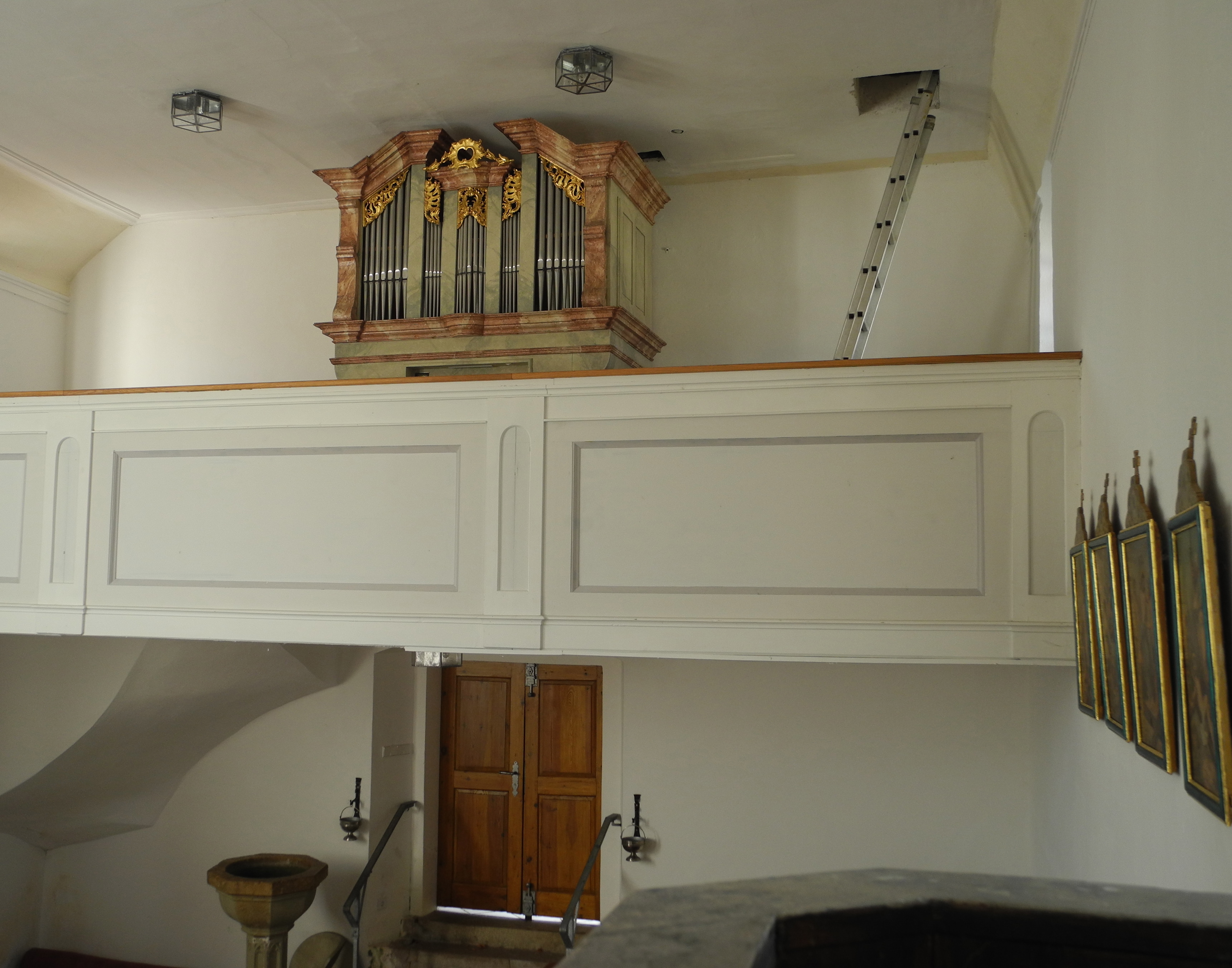 Werk 1992 Weise (7/I/P)